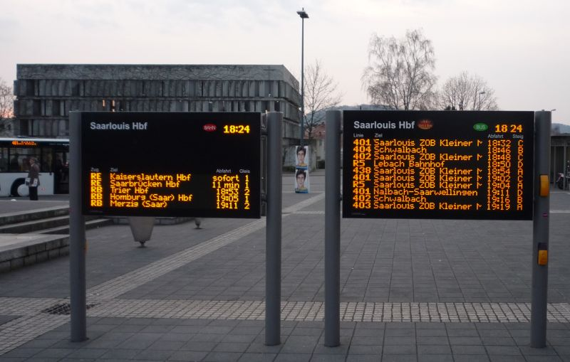 Dynamische Fahrgastinformation für Busse und Bahn vor dem Hauptbahnhof Saarlouis